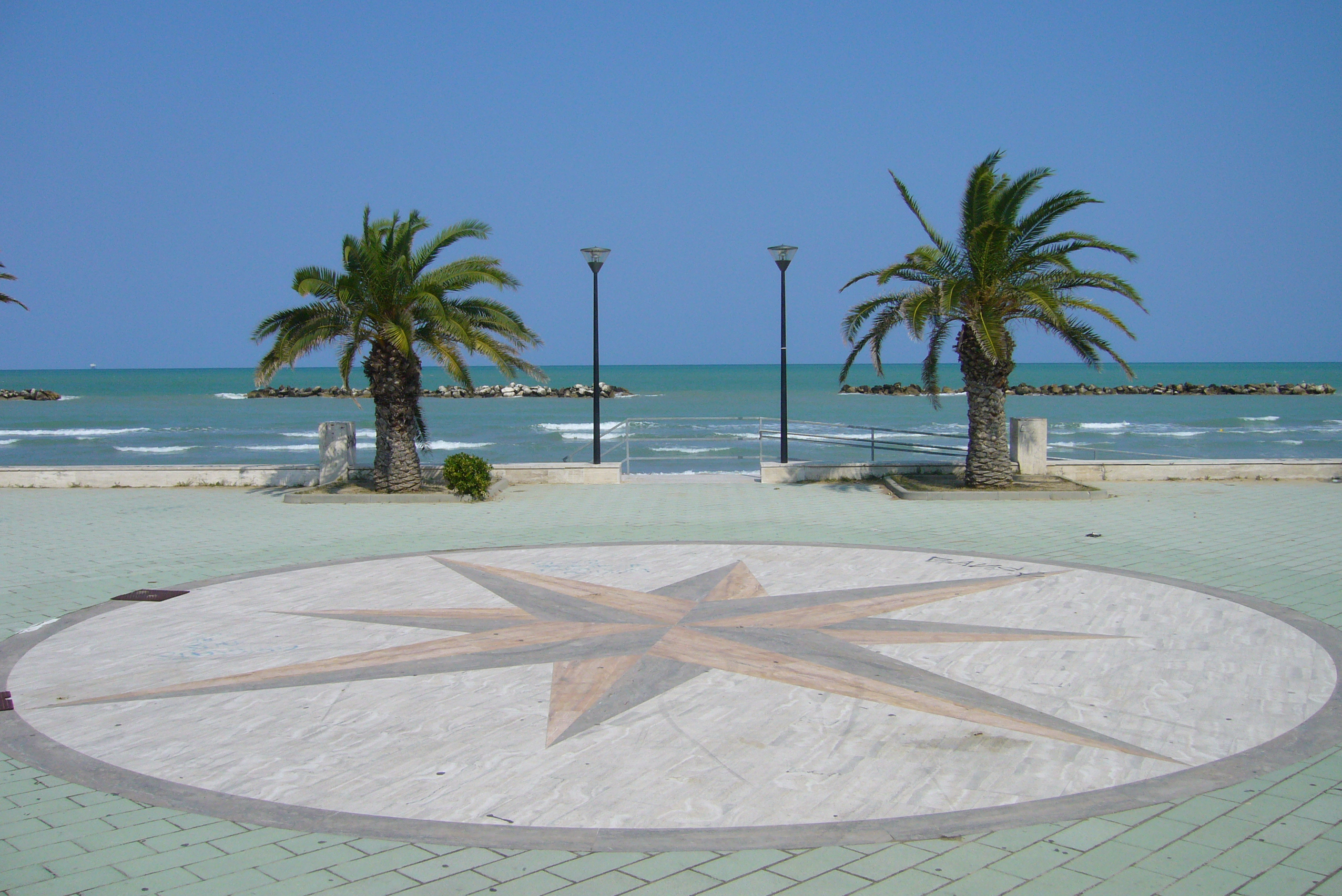 La Piazzetta sul Lungomare